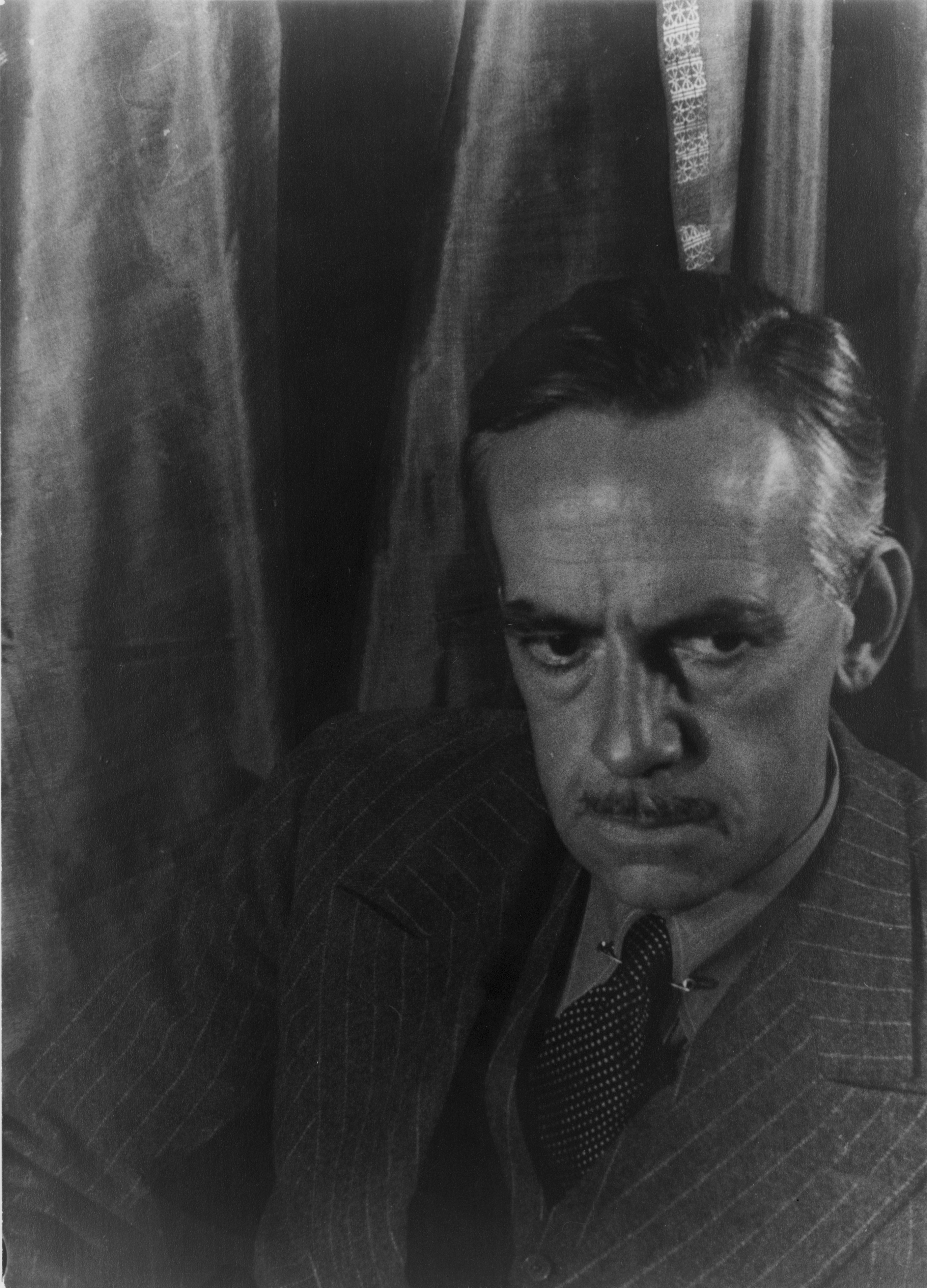 Eugene O'NeillPortrait of Eugene O'Neill